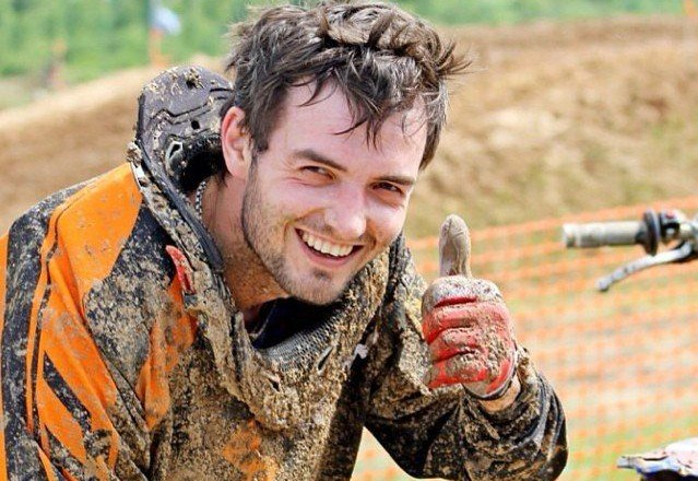 Artem Sadilov